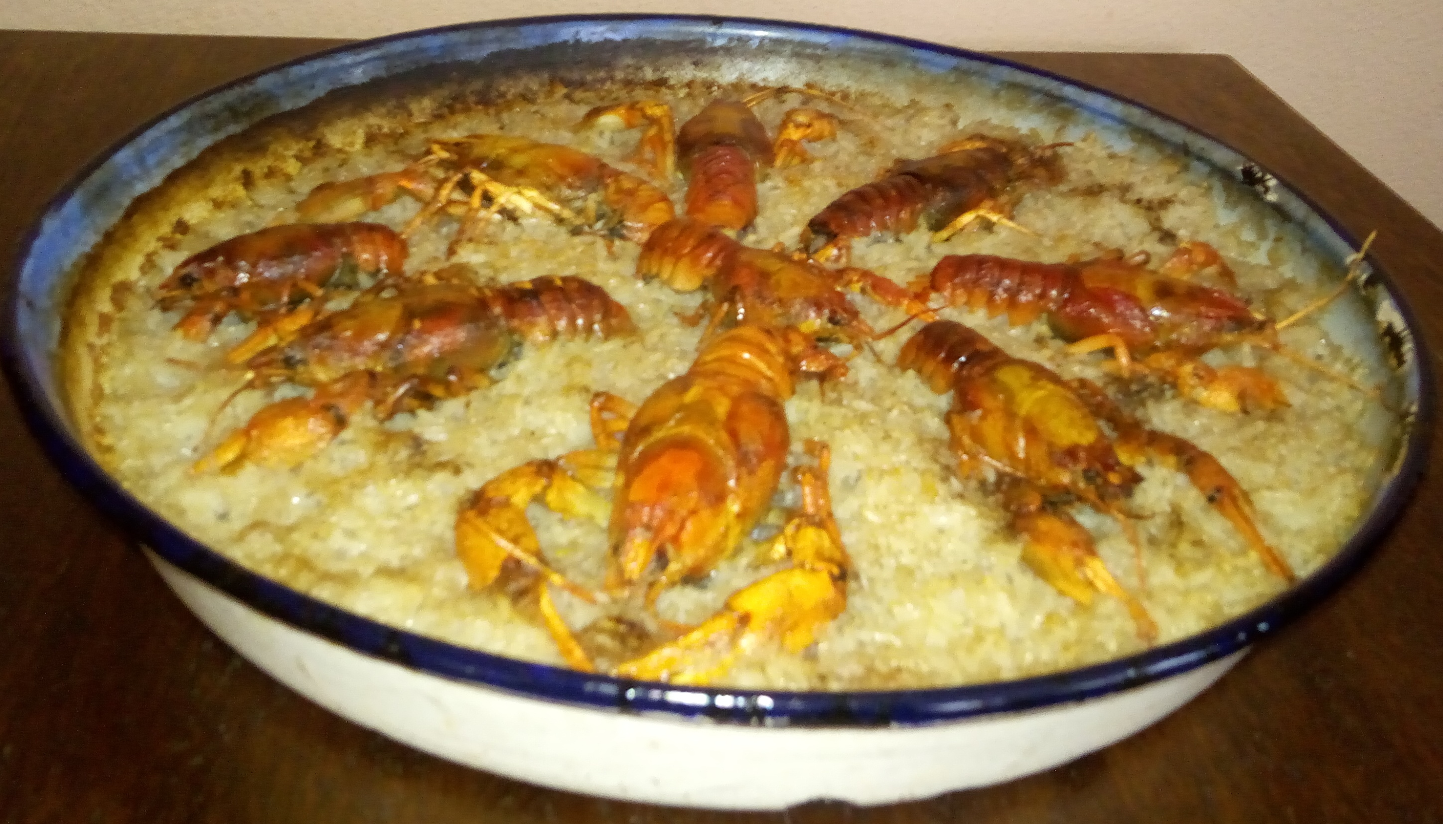 Рачник от Драгушиново